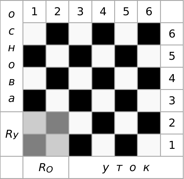 Схема полотняного переплетения.